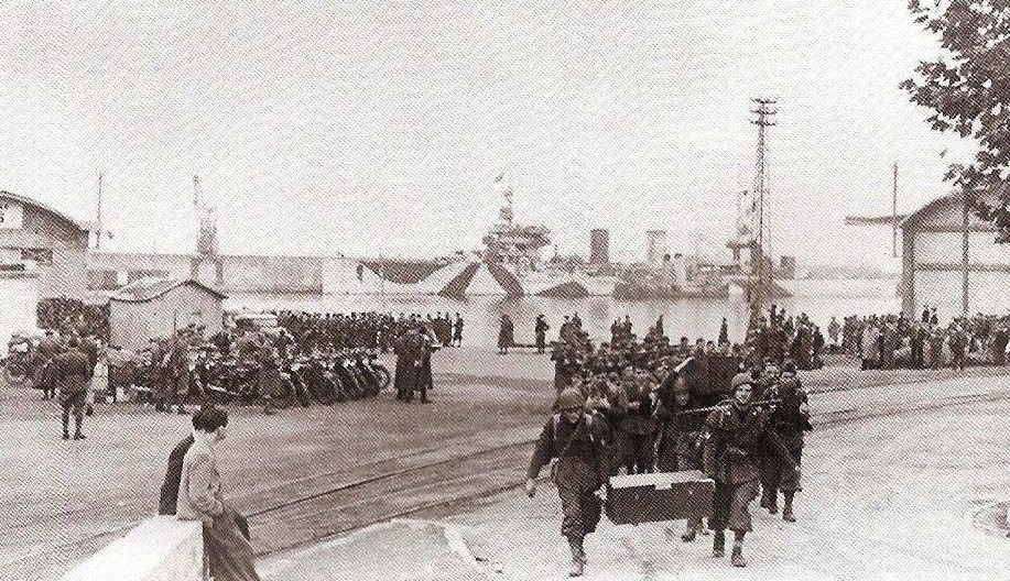 L’incrociatore leggero Bari a Bastia, durante lo sbarco italiano in Corsica.